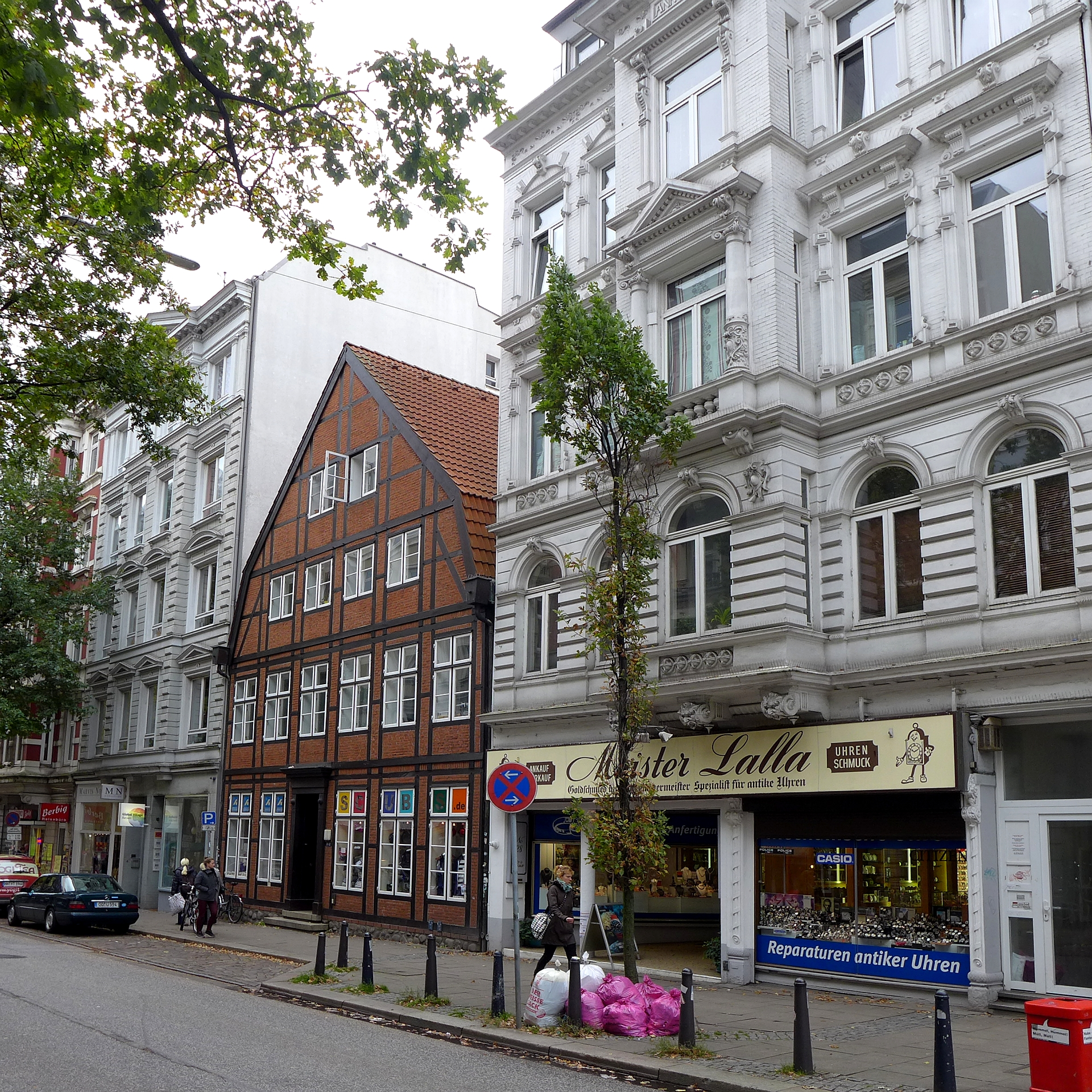 Bauten aus der Gründerzeit und davor in der Lange Reihe, Hamburg-St. Georg.